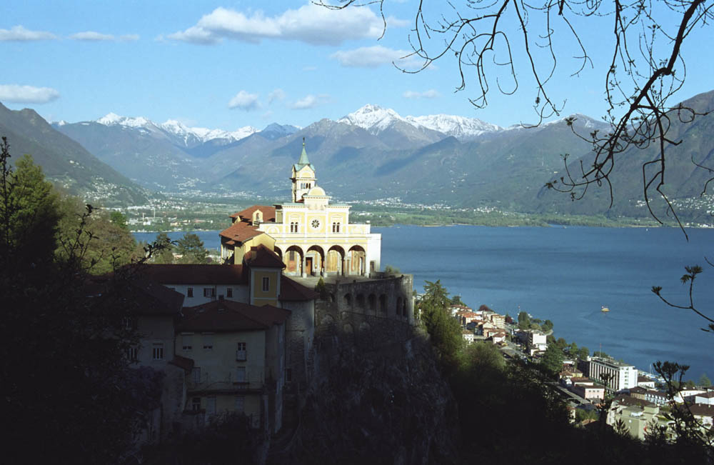 Madonna del Sasso über Locarno